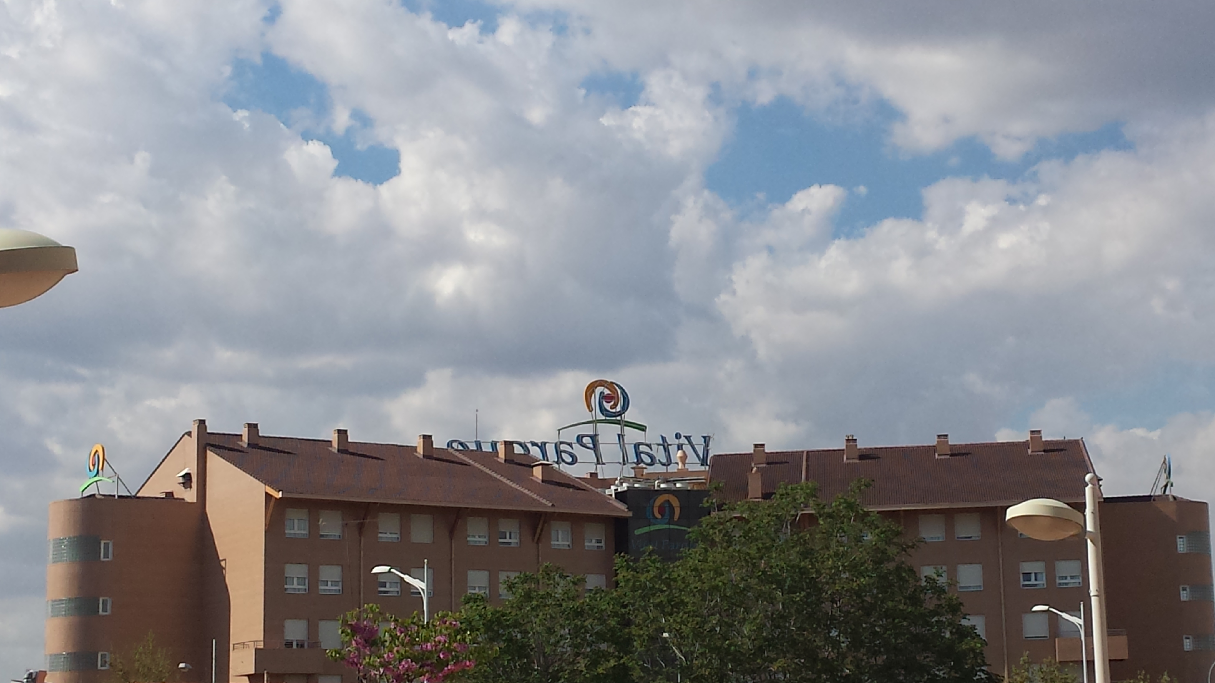 Barrio Santa Cruz Albacete. Residencia Vital Parque